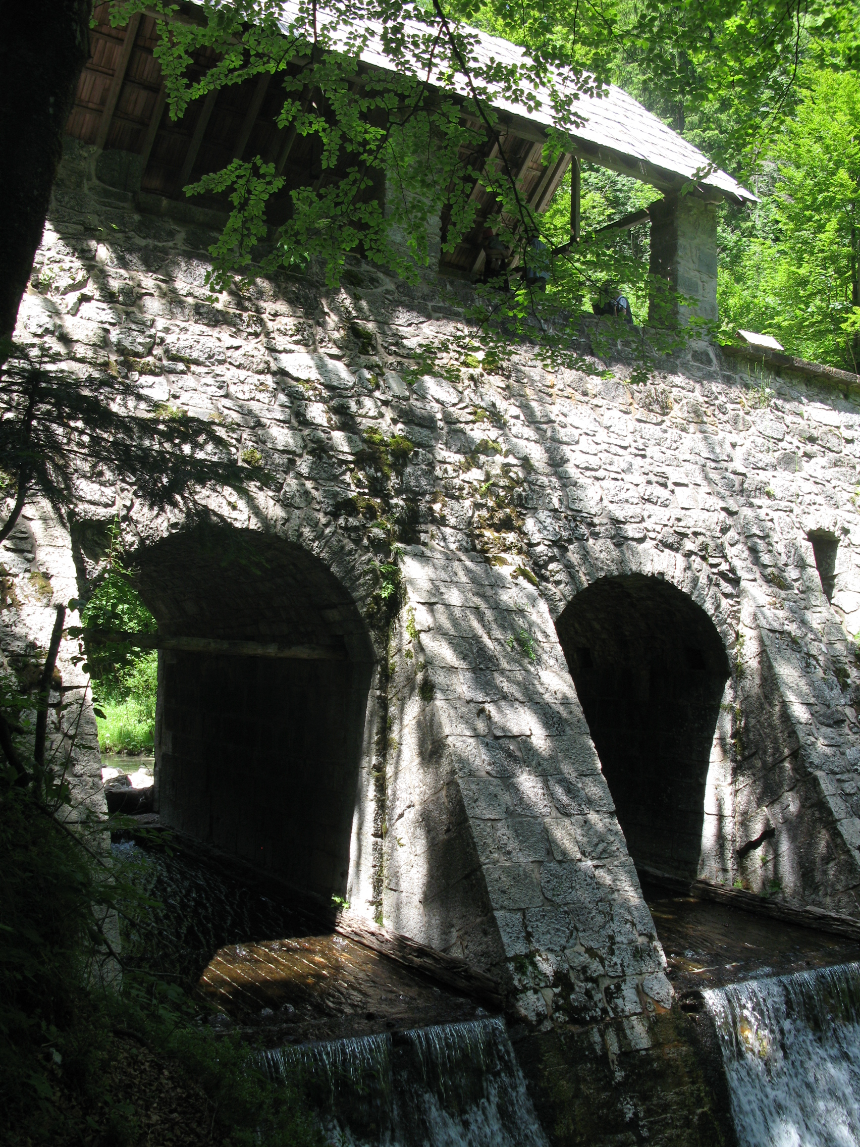 Brusove klavže na Belci (pritok Idrijce).